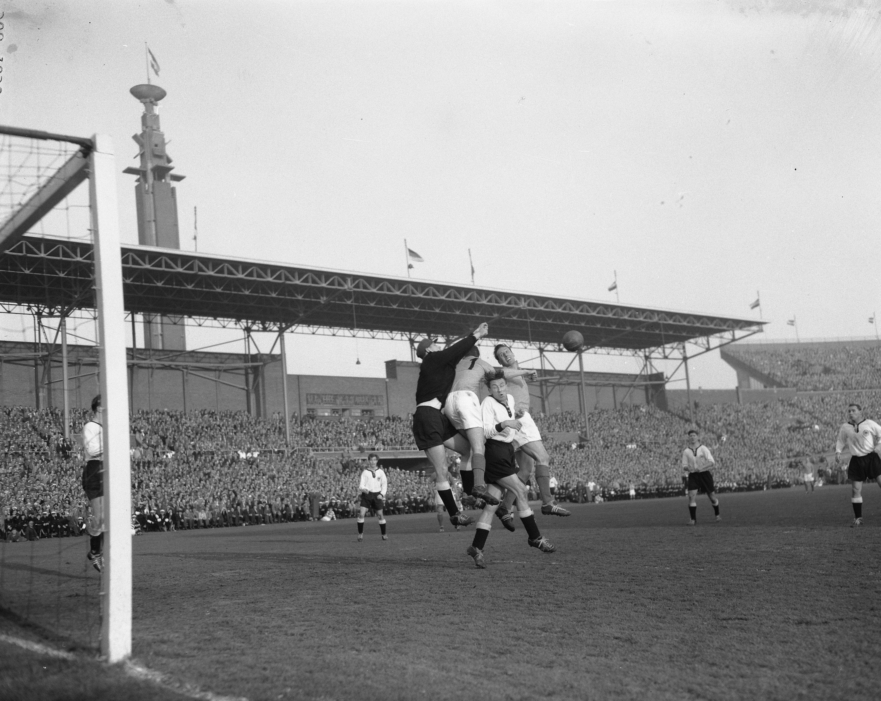 Collectie / Archief : Fotocollectie Anefo Reportage / Serie : [ onbekend ] Beschrijving : Voetbal Nederland tegen Duitsland in Olympisch Stadion Amsterdam. Duitse doelman Tilkowski, Van-der Gijp , Appel Datum : 3 april 1957 Locatie : Amsterdam, Noord-Holland Trefwoorden : doelmannen, sport, voetbal Persoonsnaam : Appel Instellingsnaam : Olympisch Stadion Fotograaf : Noske, J.D. / Anefo Auteursrechthebbende : Nationaal Archief Materiaalsoort : Negatief (zwart/wit) Nummer archiefinventaris : bekijk toegang 2.24.01.04 Bestanddeelnummer : 908-4690